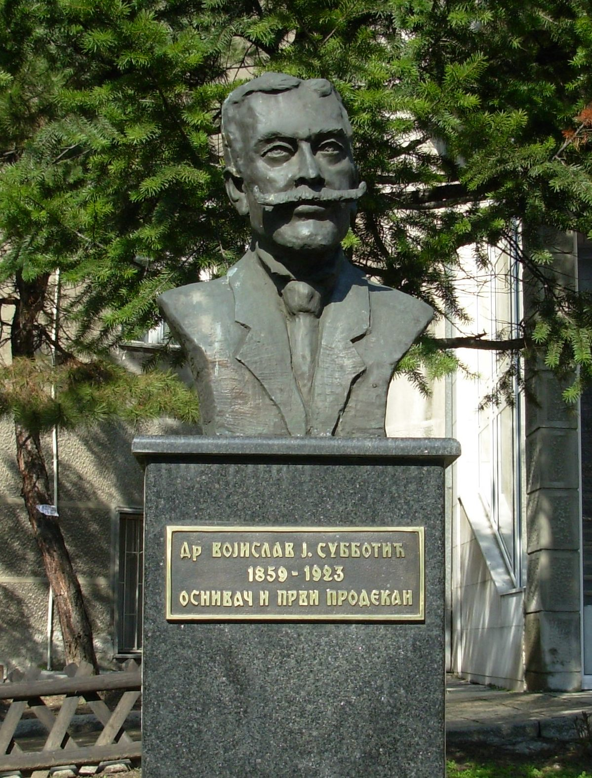 Биста Војислава Суботића у кругу Клиничког центра, Београд. Сликао Голдфингер.